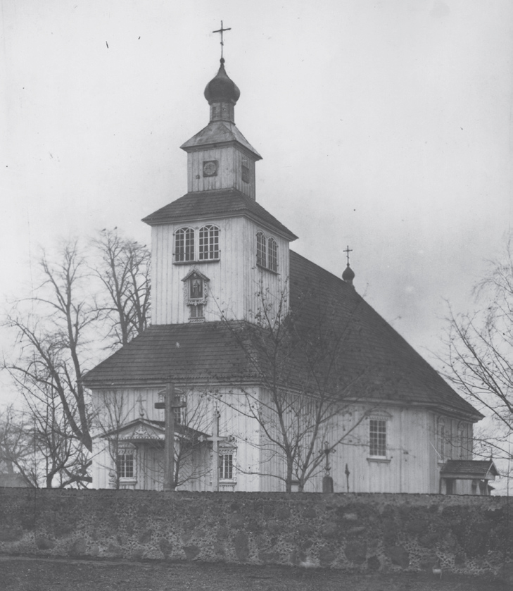 Беларуская (тарашкевіца): Пухлы (Puchły). Пакроўская царква